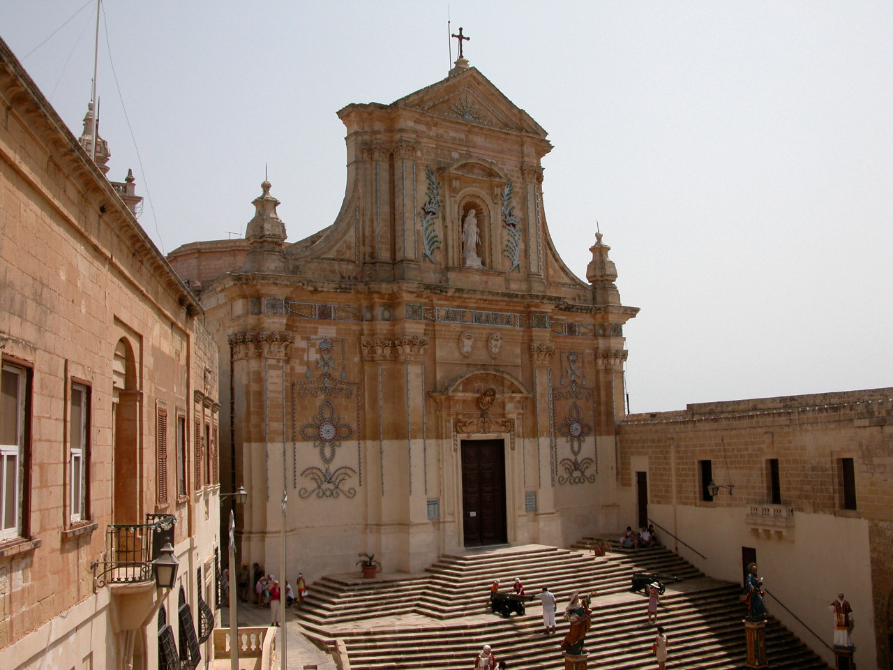 Victoria, Gozo, St. Mary. Foto scattata da Stefano Trezzi e rilasciata sotto Creative Commons.